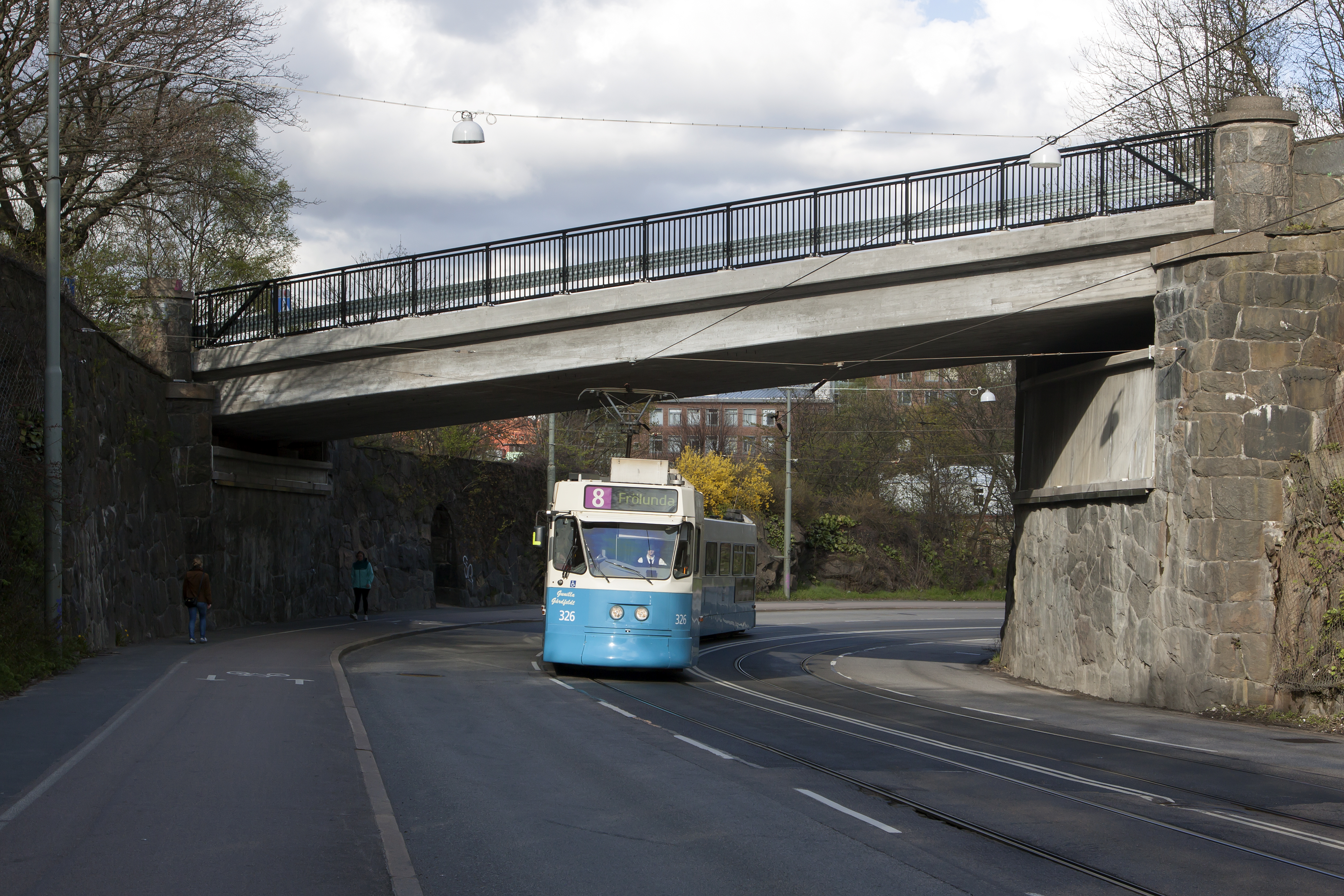 Nya Egnahemsbron över Guldhedsgatan i stadsdelen Landala i Göteborg. Bron blev klar i november 2014.